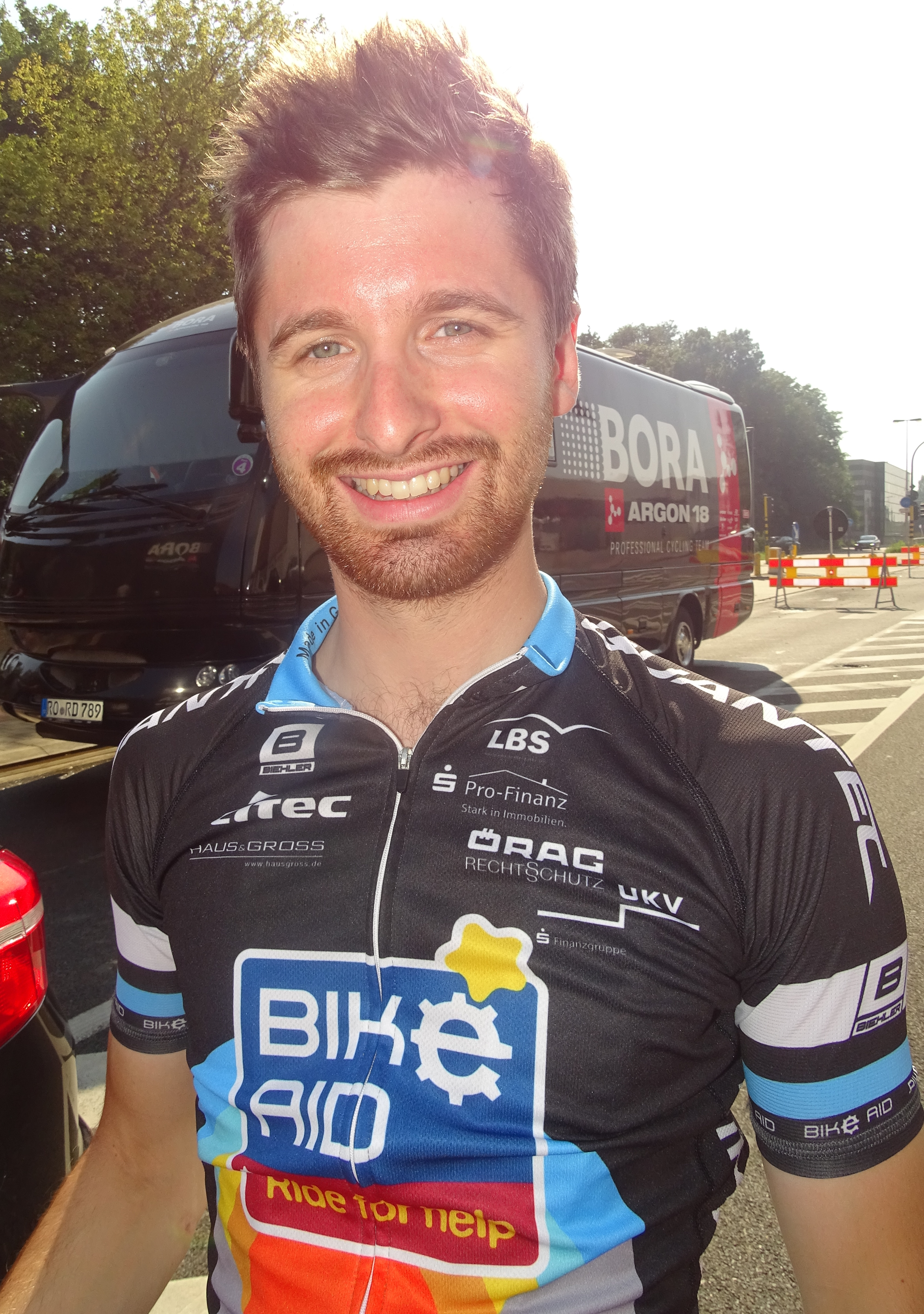 Reportage réalisé le dimanche 30 août à l'occasion du départ et de l'arrivée de la Coupe Sels 2015 à Merksem (Anvers), Belgique.